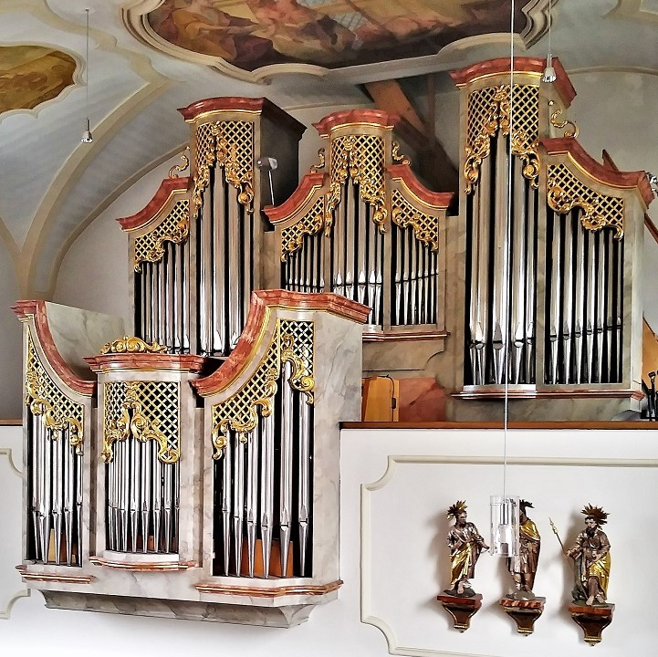 Kirche St. Johann Baptist (Taufkirchen) - interior